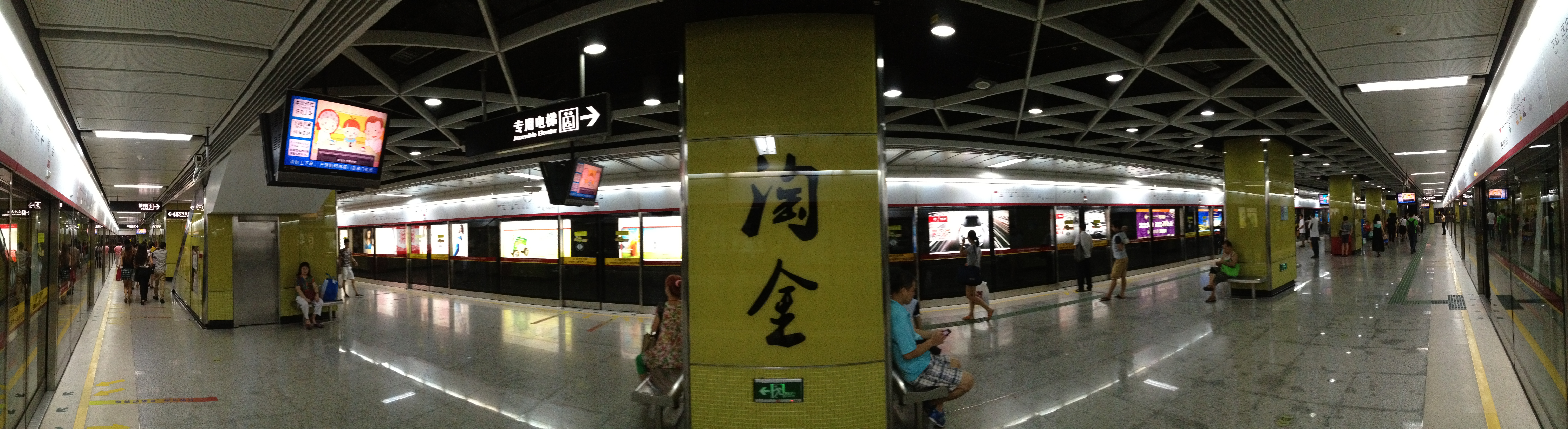 广州地铁淘金站月台全景图